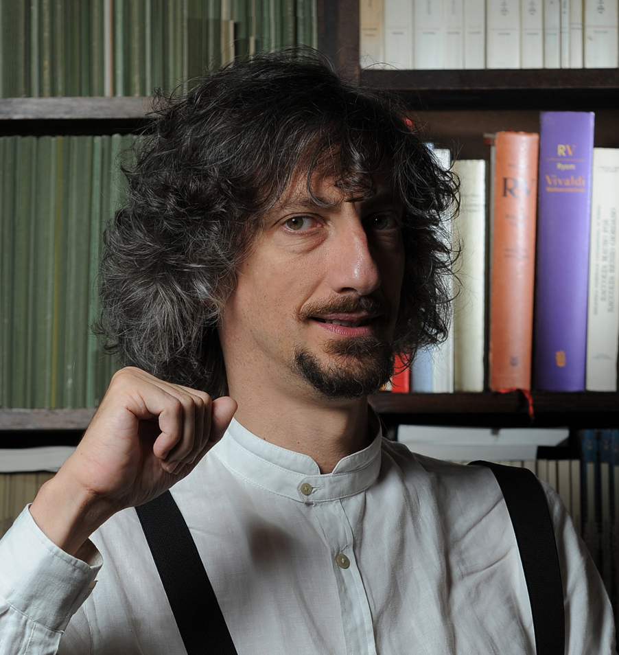 Portrait of Federico Maria in his library